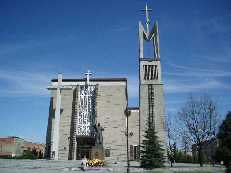 Stalowa Wola, Church